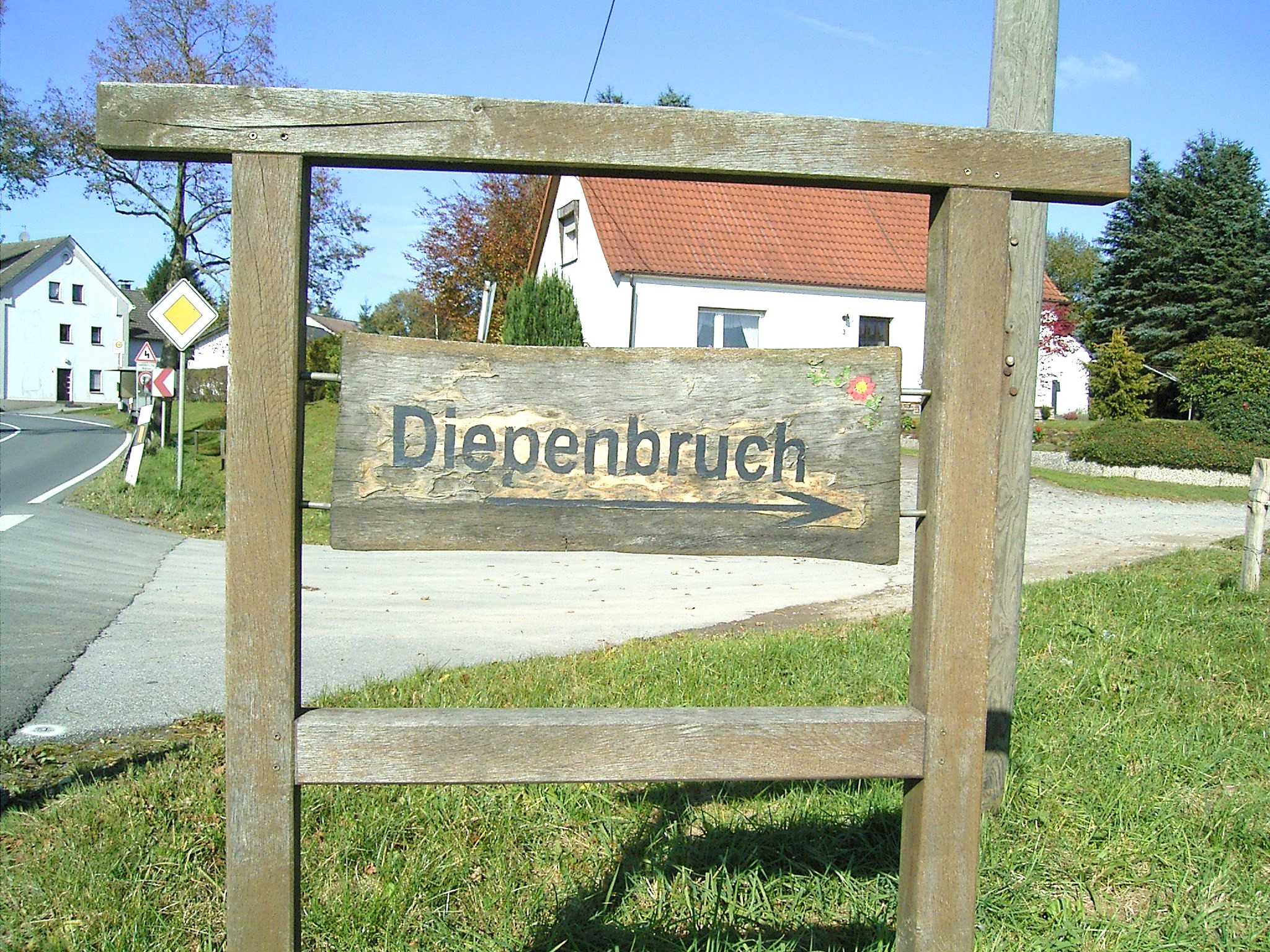 Radevormwald